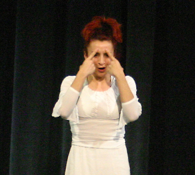 La actriz Anita Martinez participando de Teatro x la Identidad, Buenos Aires, Argentina